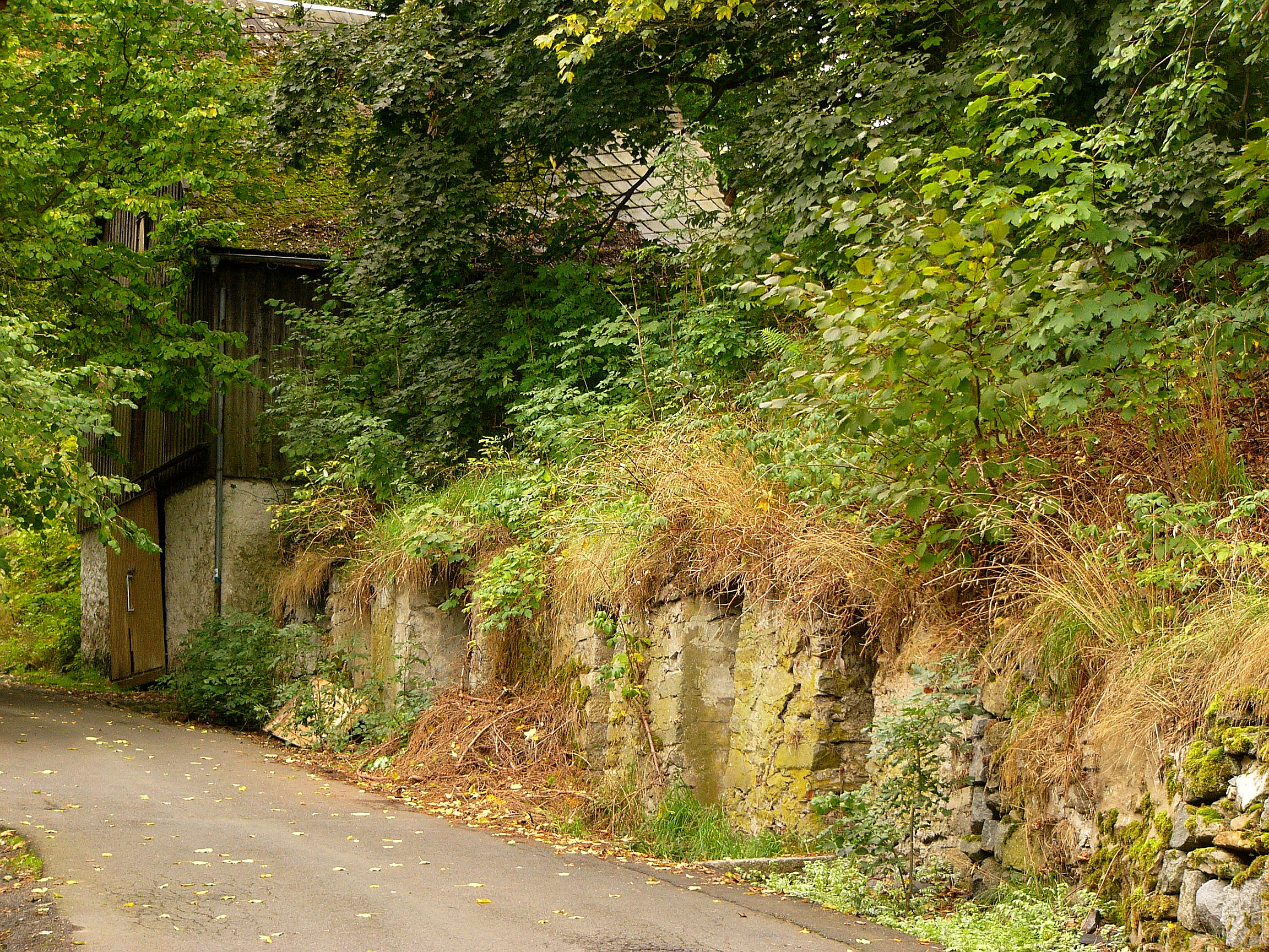 Kellergasse mit 27 Felsenkellern, 18./19. Jahrhundert.This is a photograph of an architectural monument.